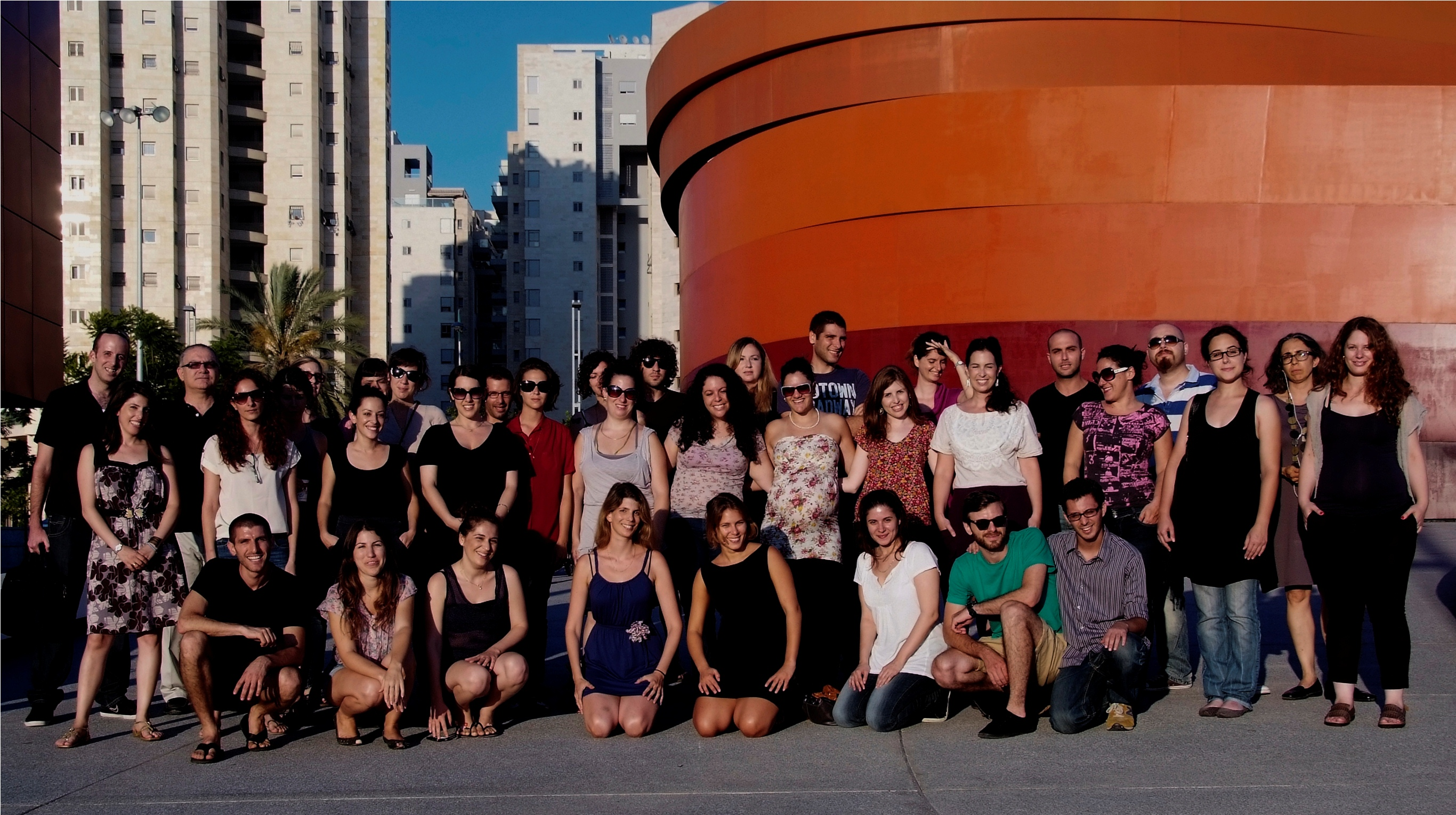 יזמי עיצוב מחזור א' - לצאת מהקופסא